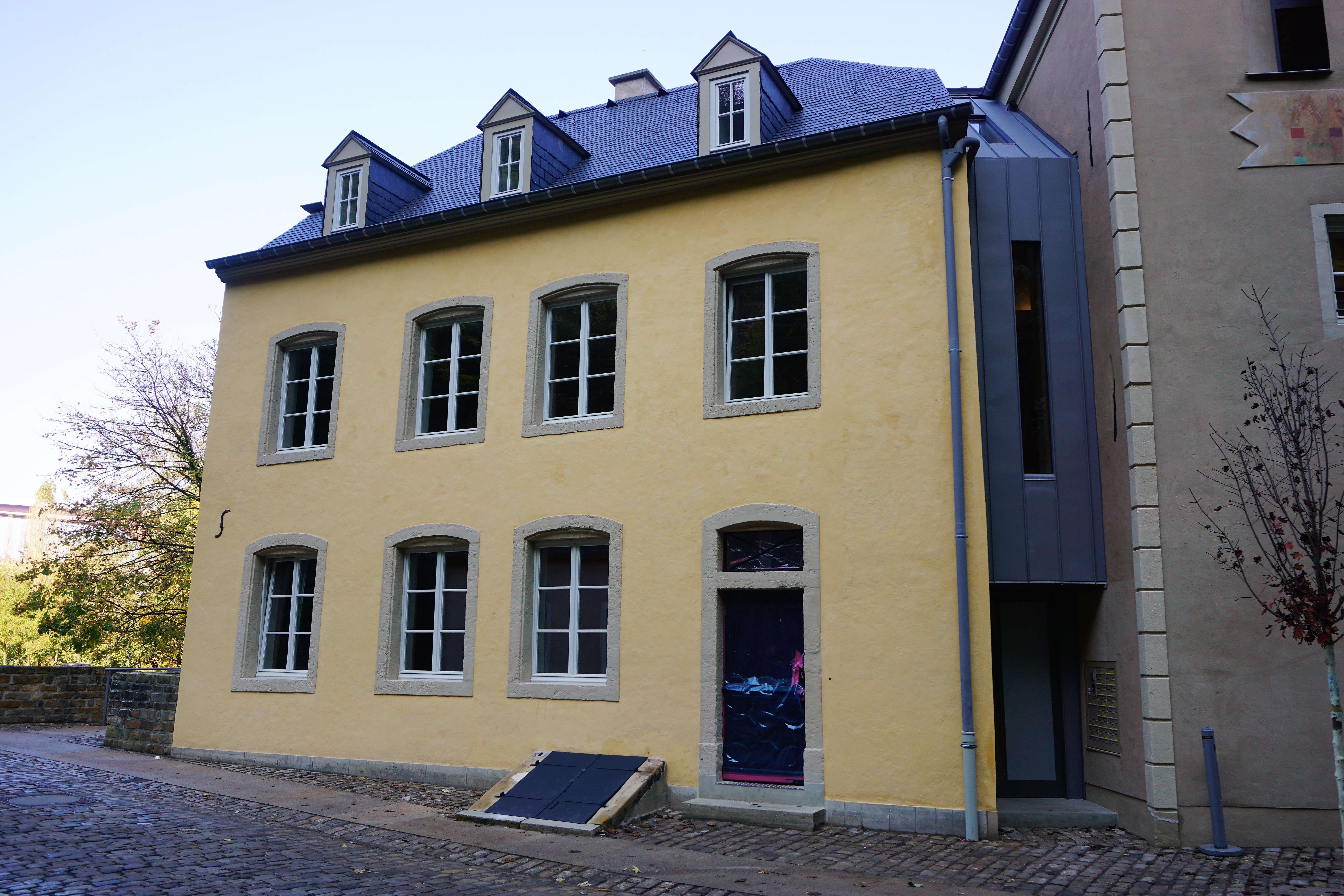 Luxembourg: reconversion de l'ancien moulin Mohrfels (Muerbelsmillen) par une remise en état et transformation de l'ancienne moutarderie à Pfaffenthal (rue Mohrfels). Vue sur la maison "Flohr".